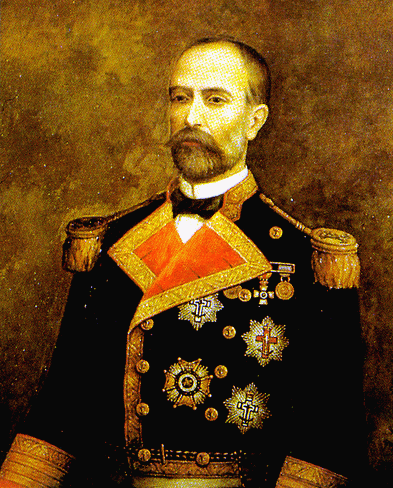 Cuadro de la Armada del capitán de navío Joaquín Bustamante y Quevedo, fallecido en cuba en 1898.